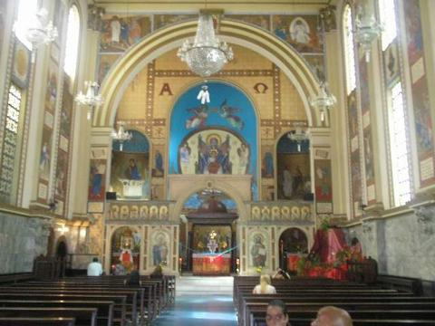 Interior da Catedral Nossa Senhora do Paraíso - São Paulo - SP